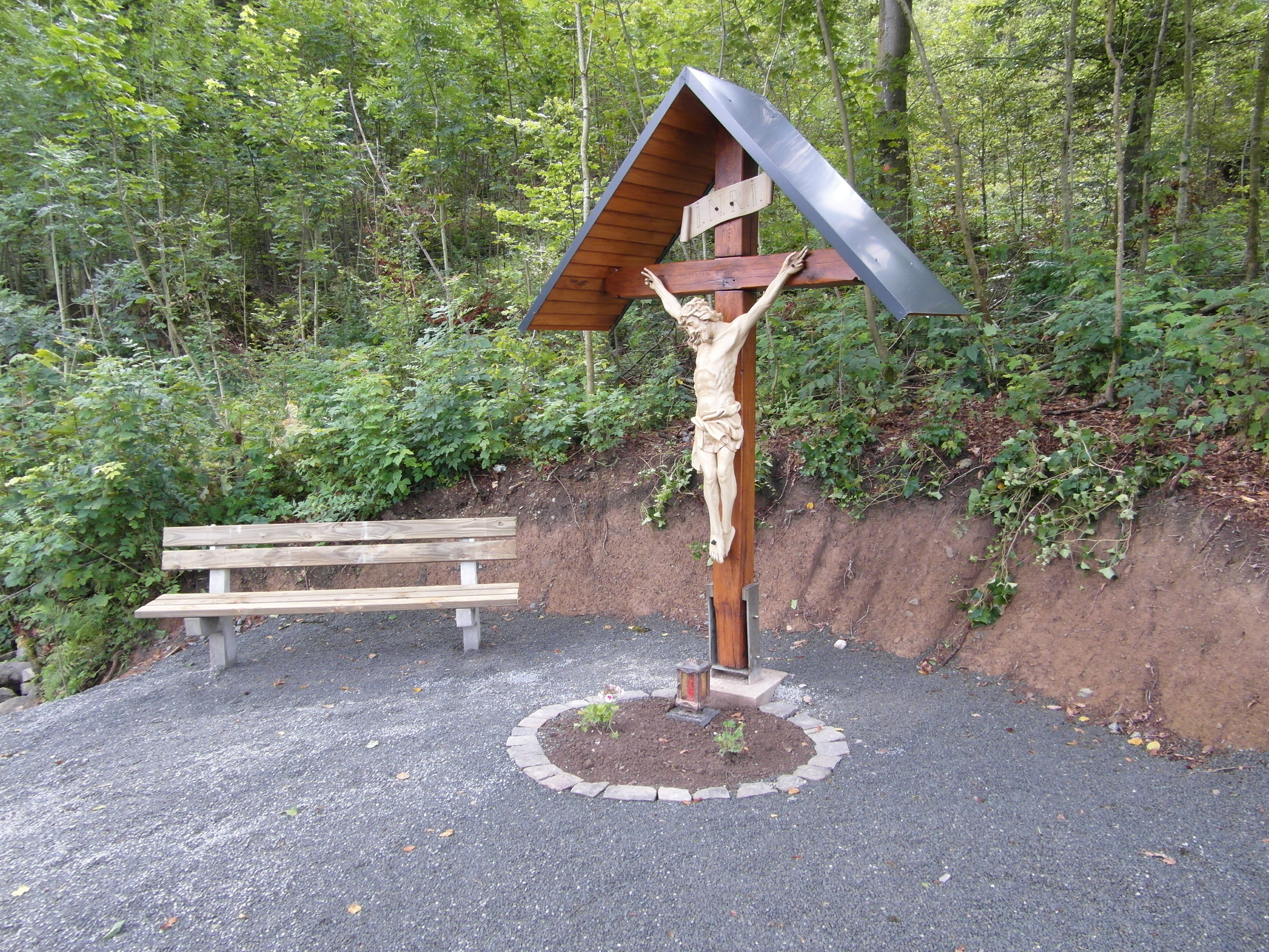 Vom Kapellenverein nach Kyrill (2007) neu eingerichtete Ruhebank mit Kruzifix im Dahl